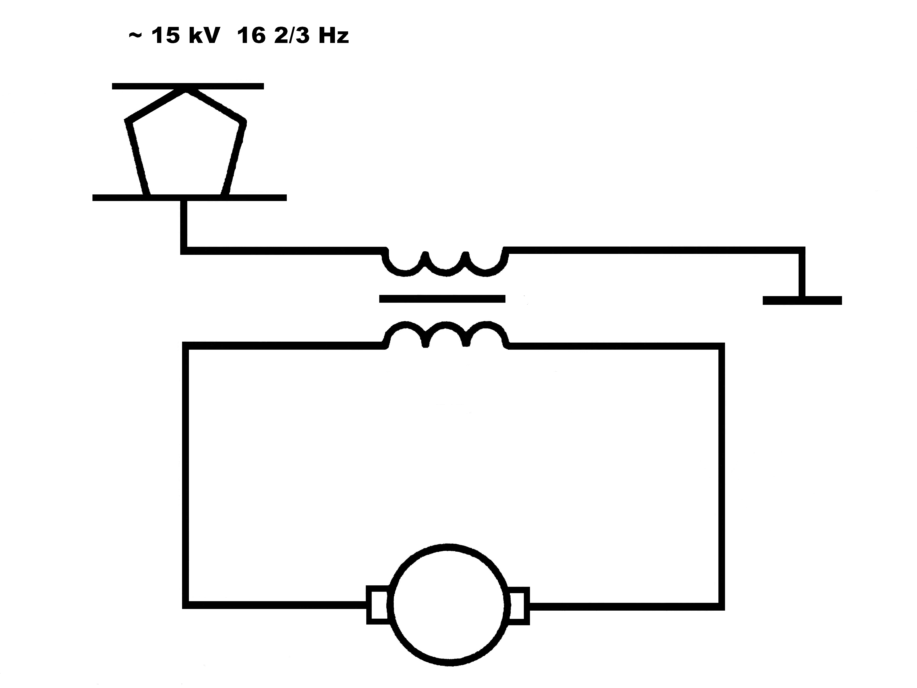 Схема электровоза переменного тока 15 кВ 16,66 гц